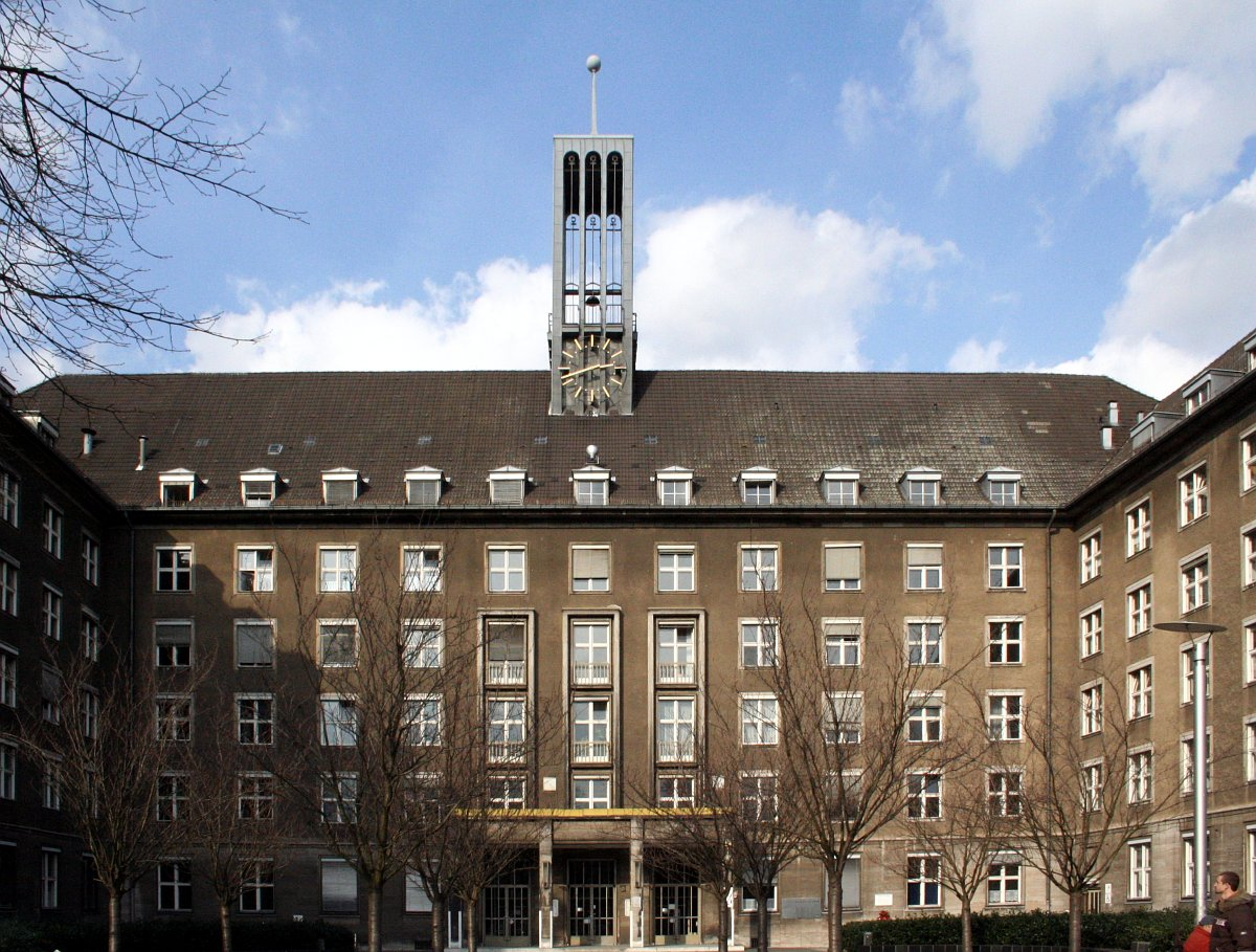 Frontseite des Rathaus Tiergarten.